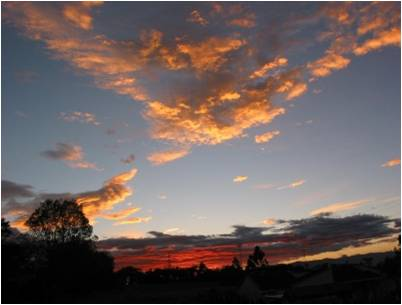 Atardecer, Municipio de concordia, Antioquia, Colombia.